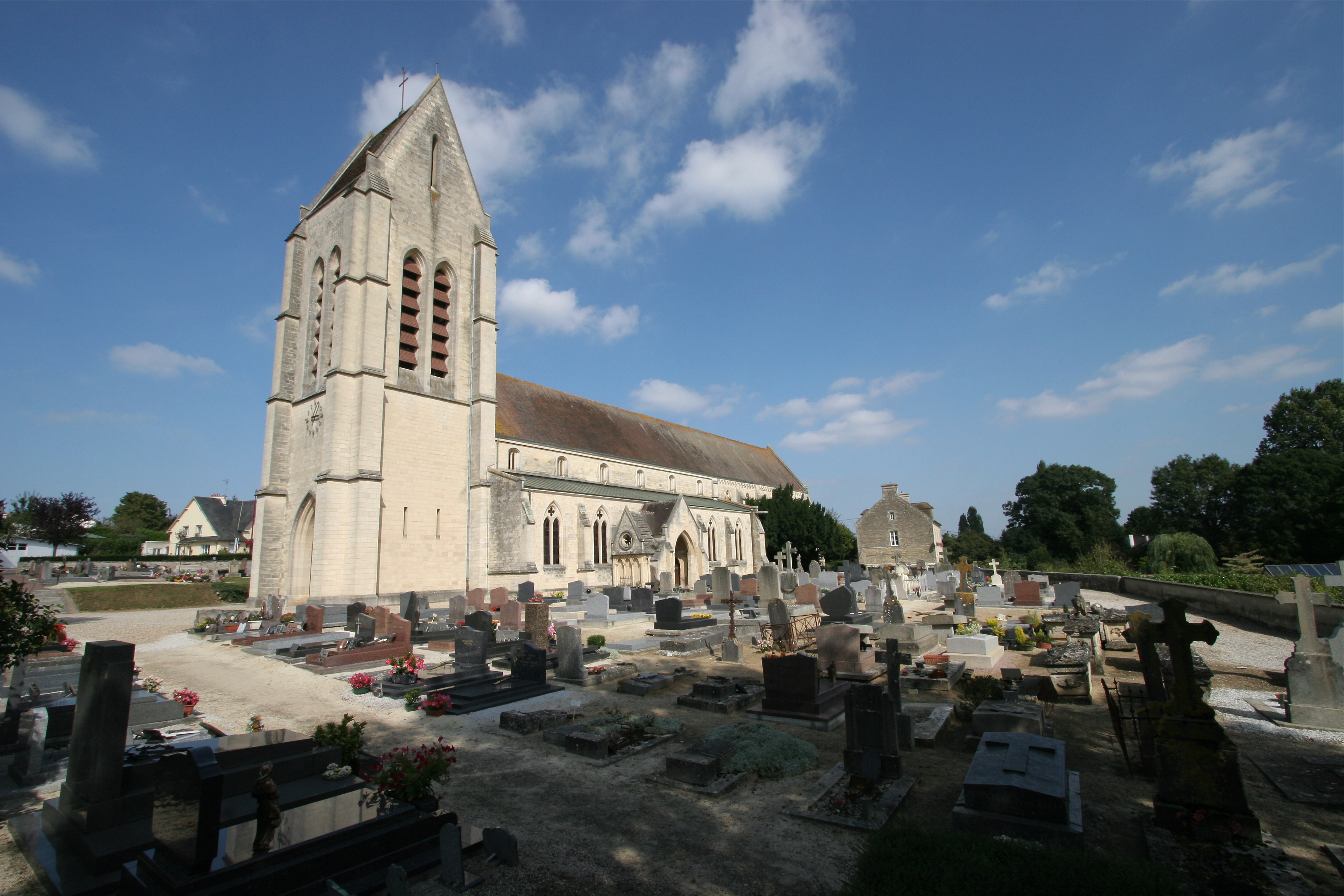 Église d'Évrecy (Calvados, France)